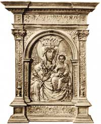 Беларуская (тарашкевіца): Абраз Маці Божай Юравіцкай (Maci Božaja Juravickaja)